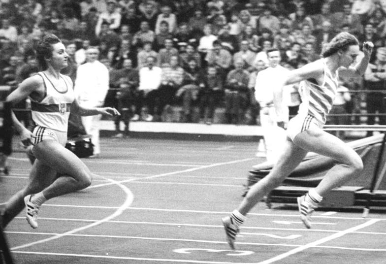 Heike Drechsler, Silke Gladisch ADN-ZB Kluge 16.2.86 Bez. Cottbus: DDR-Hallenmeisterschaften in der Leichtathletik- neue Hallenweltbestleistung - Weitsprungweltmeisterin Heike Drechsler (SC Motor Jena, r.) stellte mit 10,24 sec in Senftenberg einen neue Hallenweltbestleitung über 100 Yard auf. Sie gewann vor Silke Gladisch (SC Empor Rostock, l.).